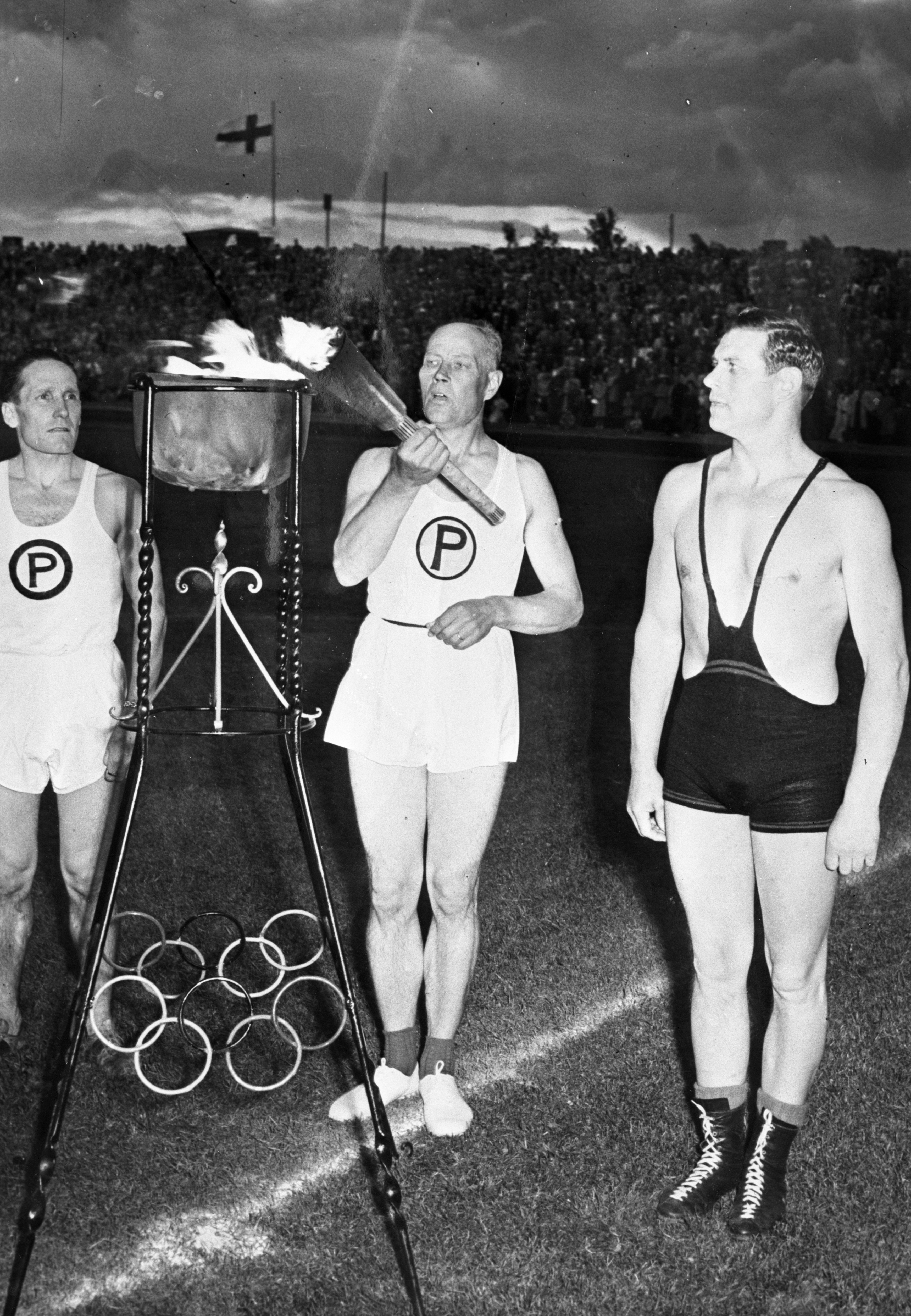 Soihdunkantaja Paavo Yrjölä sytyttää olympiatulen Ratinan stadionilla Tampereella 16.7.1952. Vieressä saattajat Hannes Hallanvaara ja Ilmari Teräs katselevat.